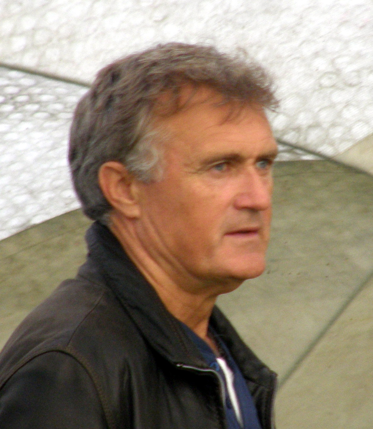 Jalgpallitreener Tarmo Rüütli